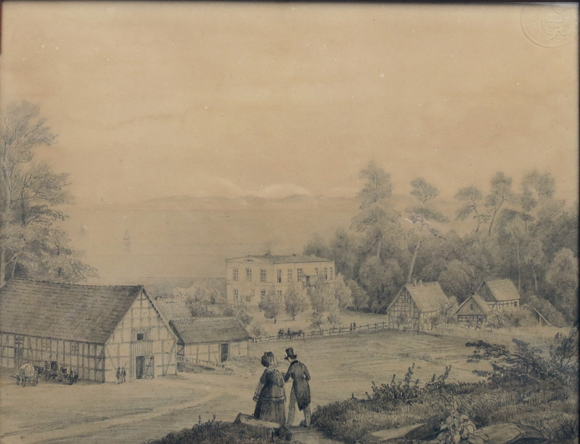 Wilhelmine v. Schack: Ansicht von Heringsdorf, um 1844